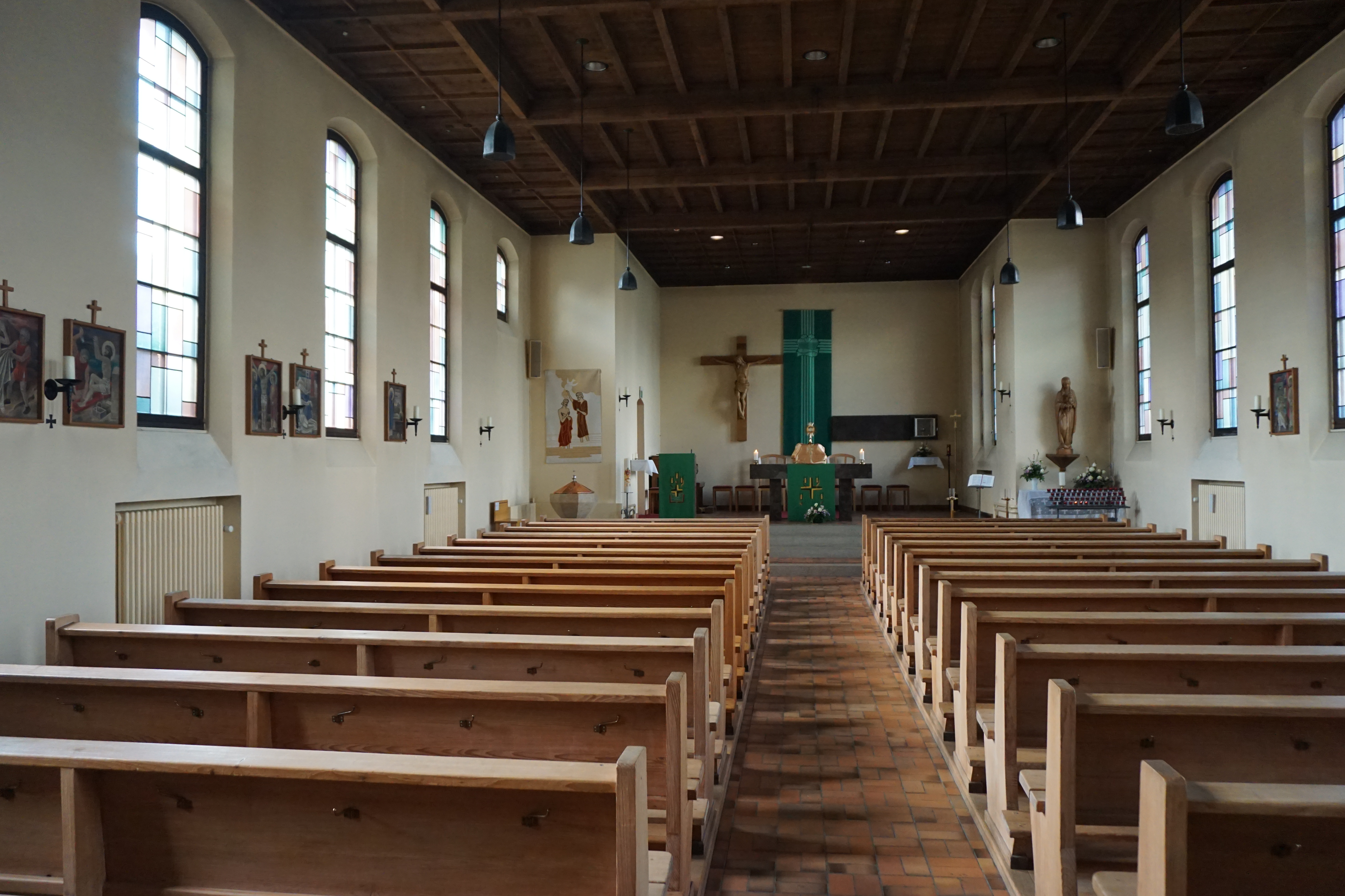 Kirchenschiff Mittelgang zum Altar